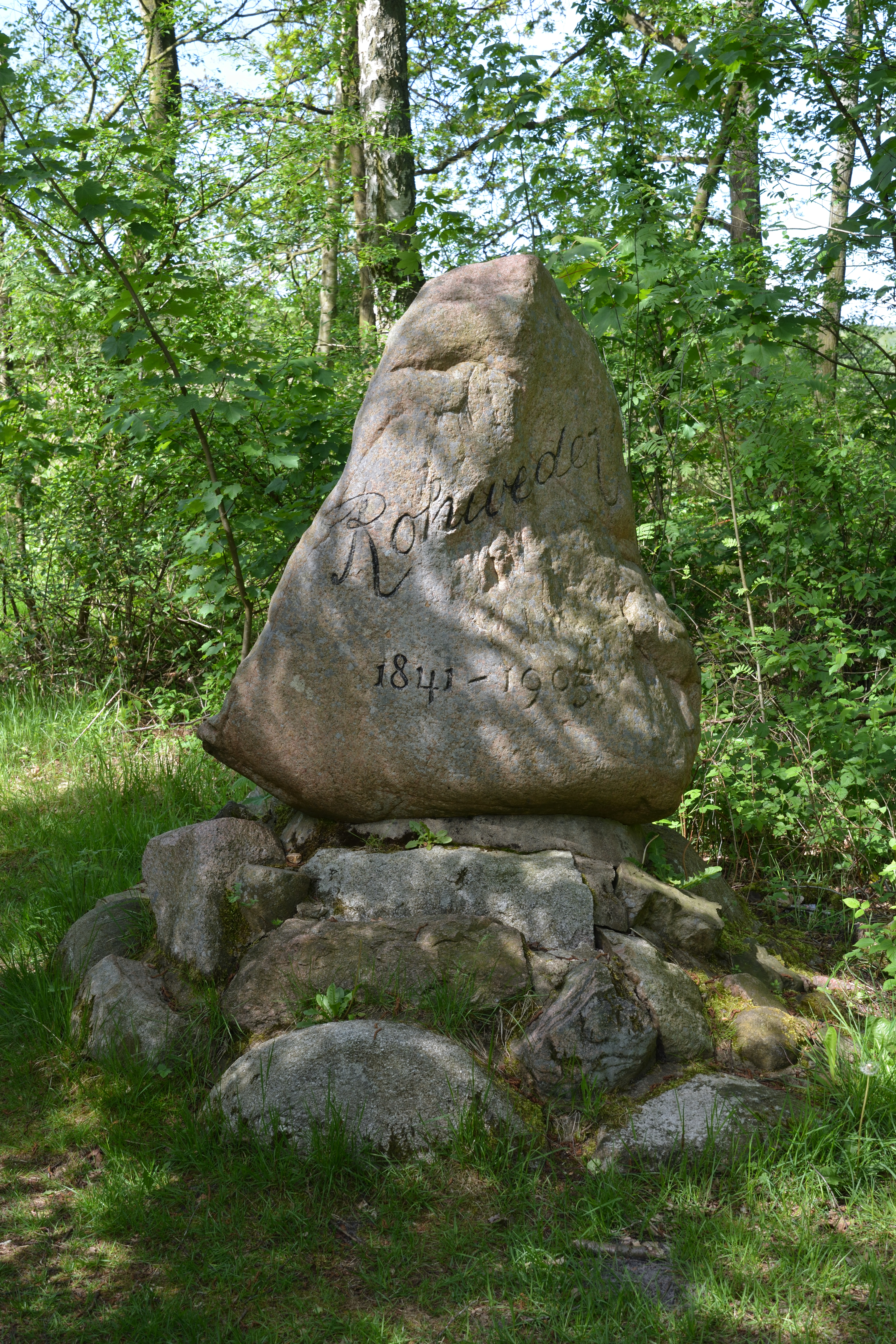 Impressionen vom Naturerlebnisraum "Mühlenau/Mildstedter Tannen" in Mildstedt, Gedenkstein für den Ornithologen Joachim Rohweder (1841-1905).